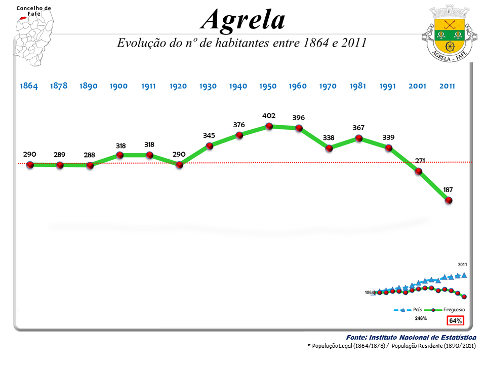 Censos 1864/2011